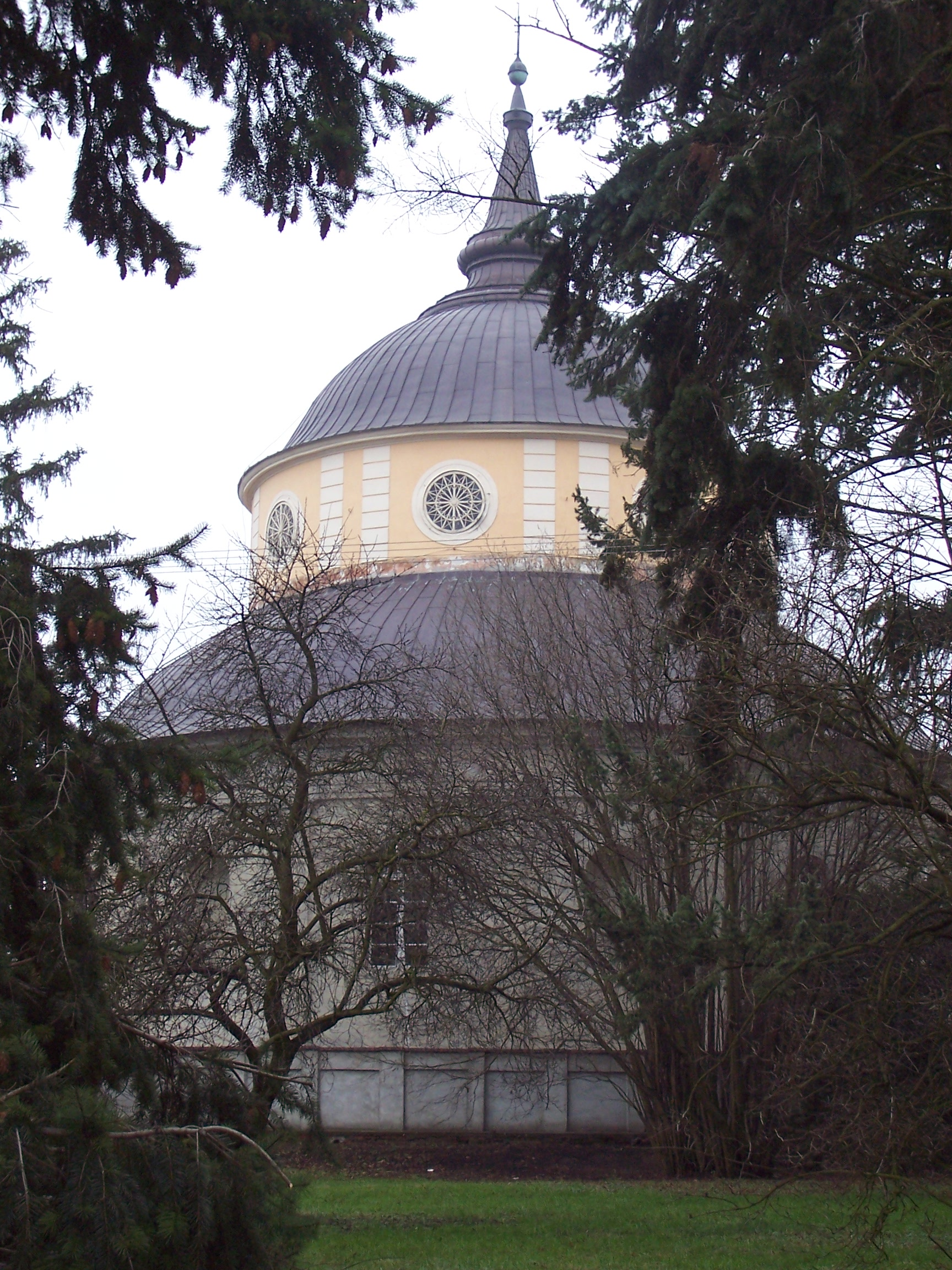 Kosciół w Parkowie